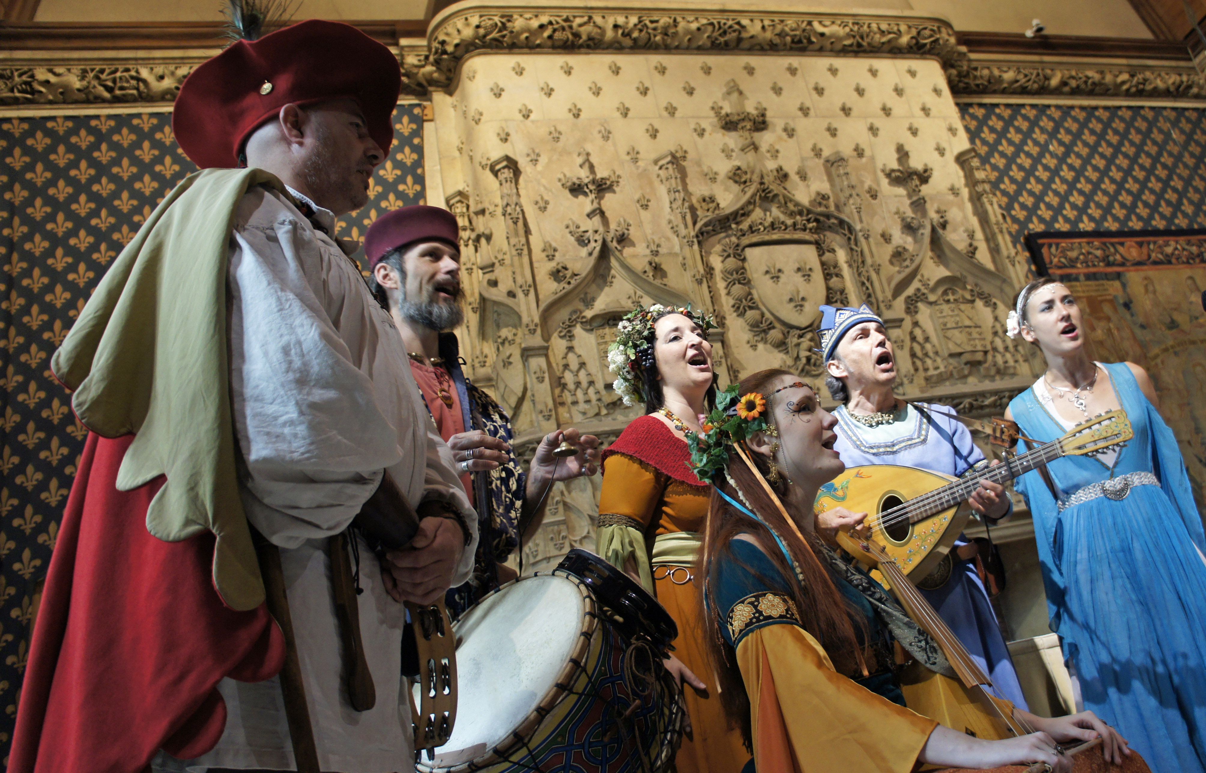 La troupe des Derniers_Trouvères chantent au baquet de Jane et Charles VII, palais du Tau.